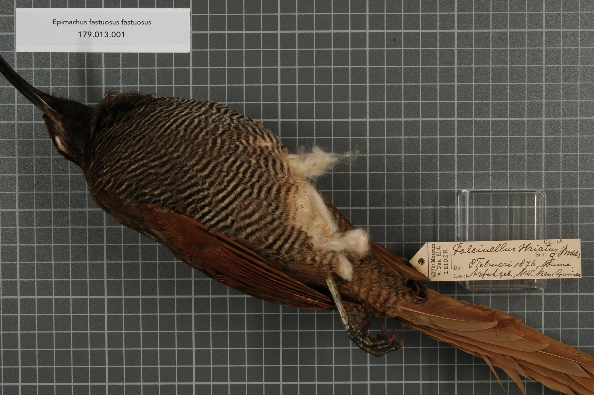 Epimachus fastuosus fastuosus (Hermann, 1783)